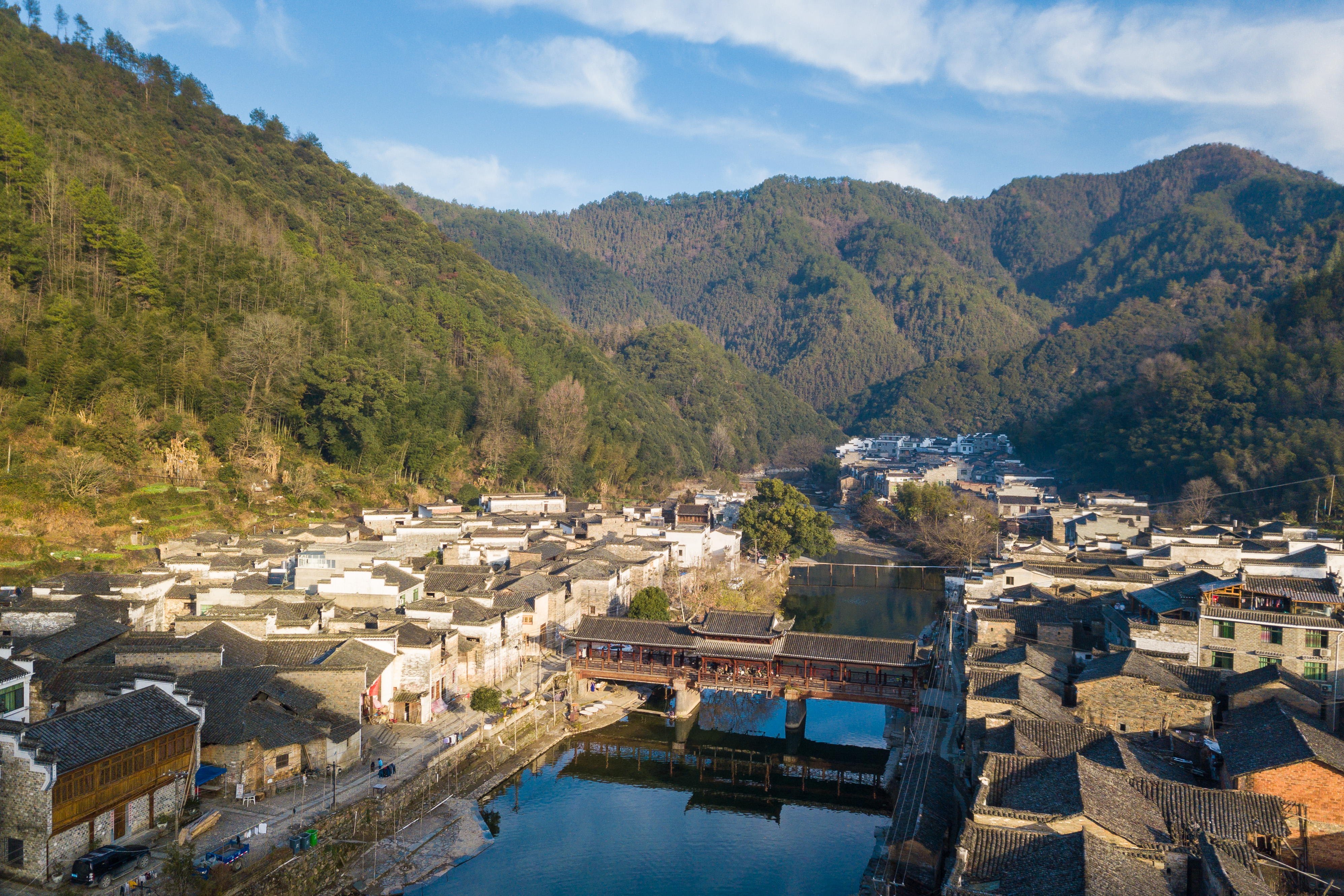 瑶里